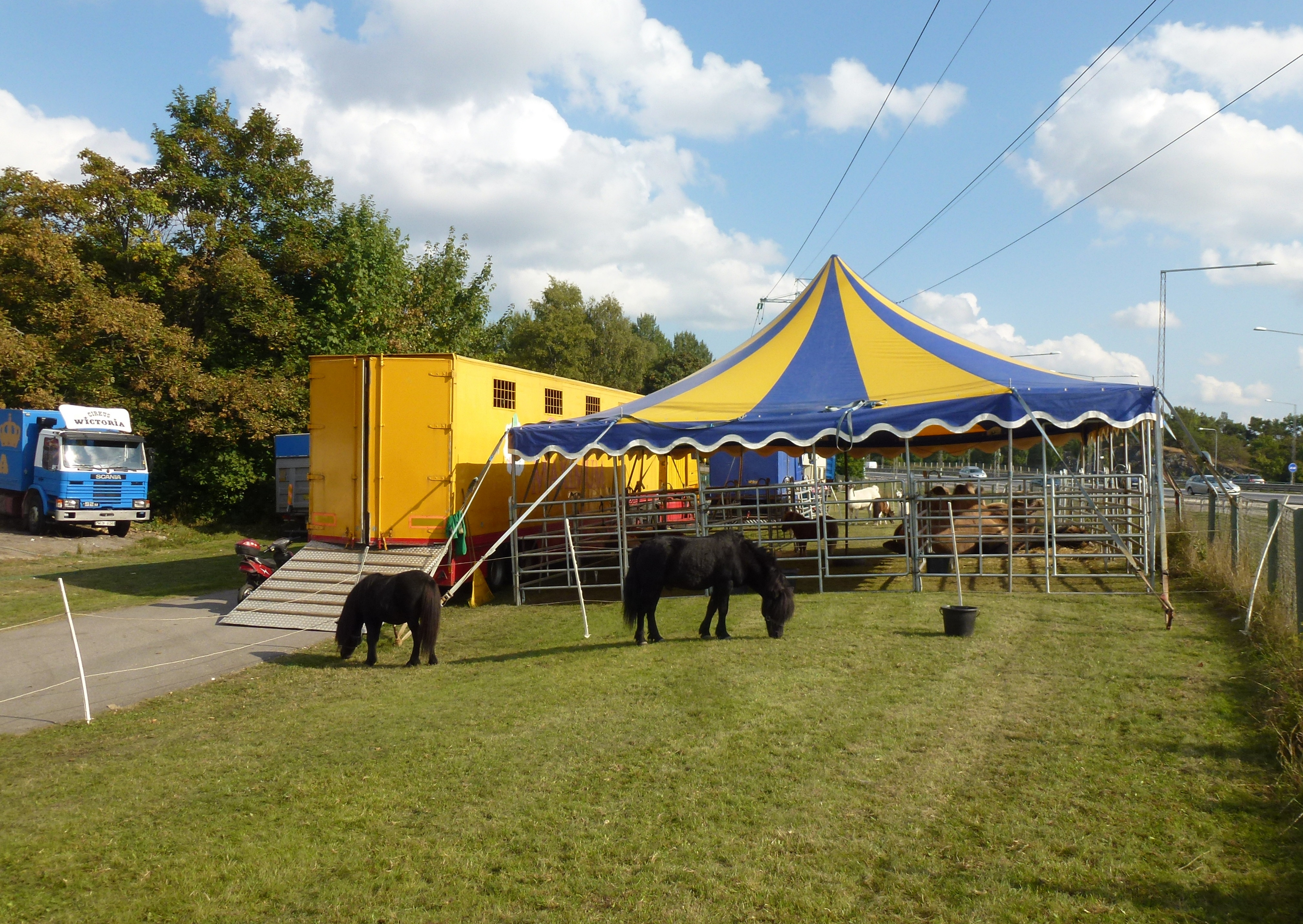 Cirkus Maximum i Västberga, djur